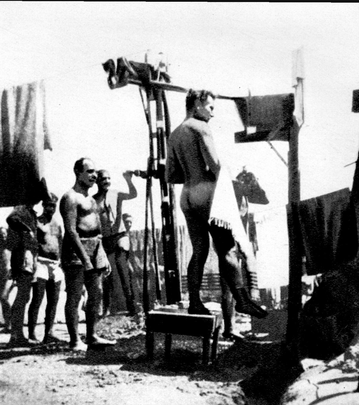 Srpskohrvatski / српскохрватски: Logor Girs (Gurs) u južnoj Francuskoj, za španske dobrovoljce. Grupa Jugoslovena sama je konstruisala tuševe za umivanje i kupanje u logoru. Prema alternativnom opisu, na fotografiji je Josip Broz. [1]